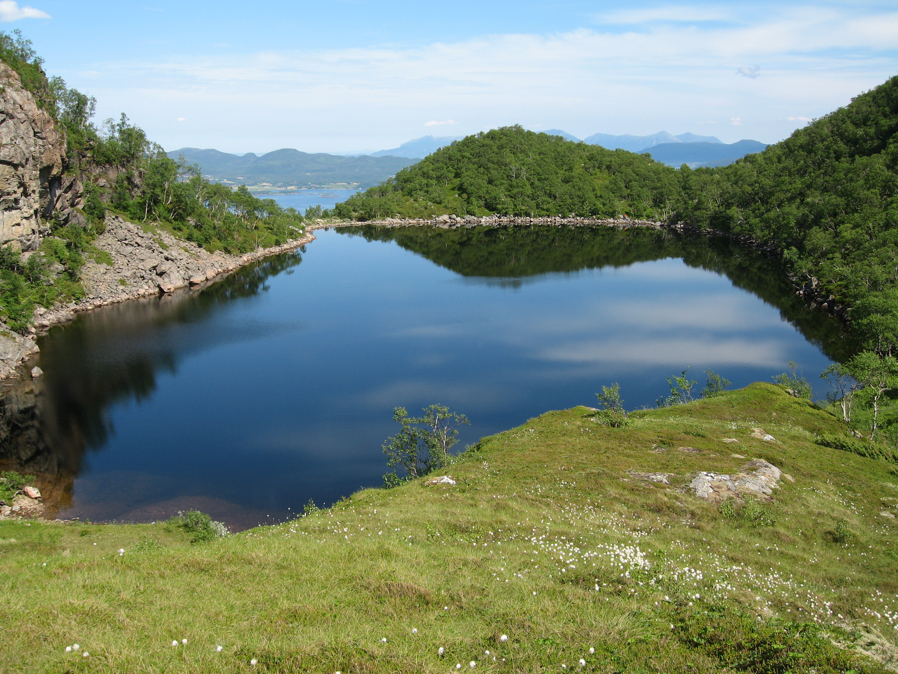 Sortavatnet